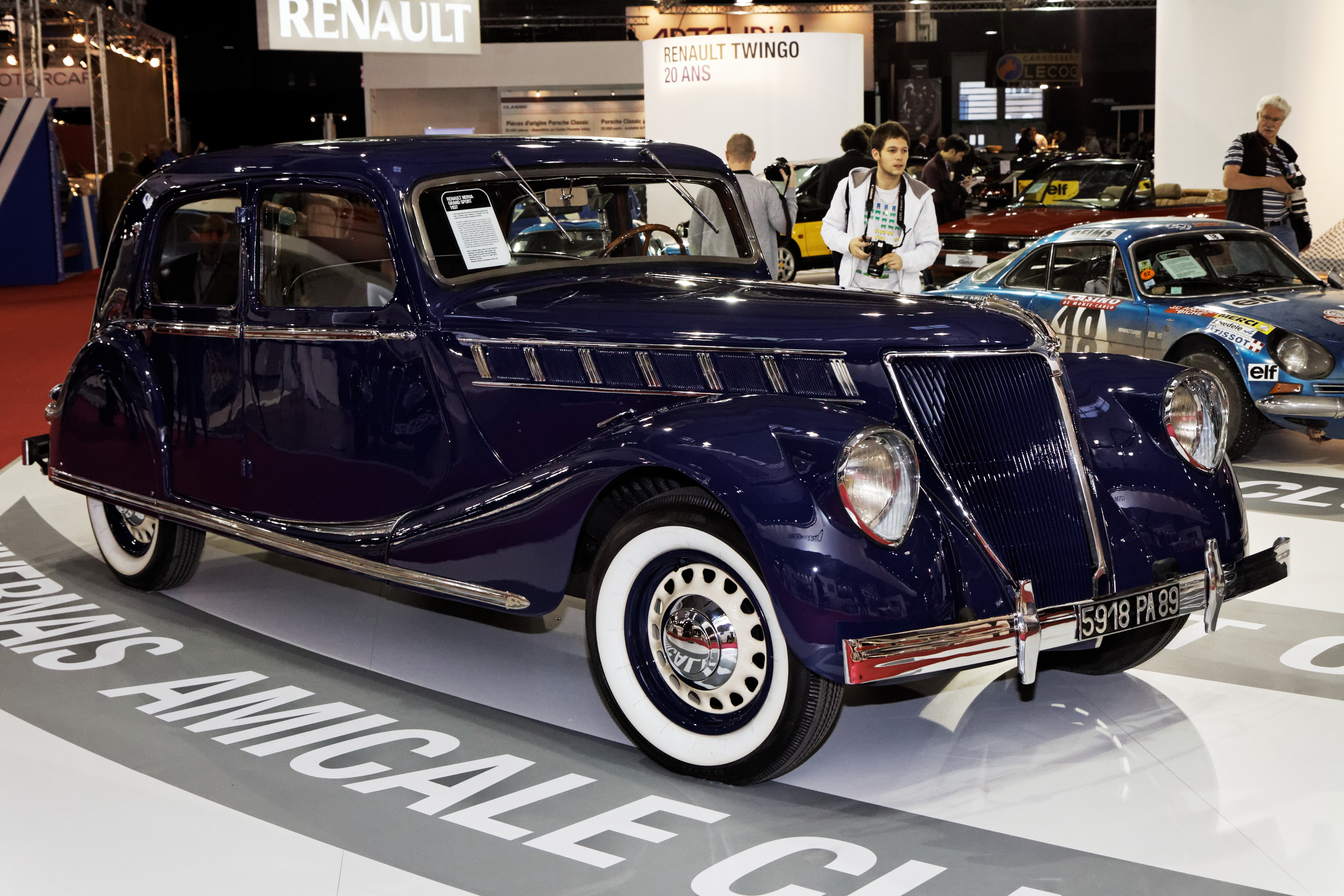 Une Renault Nerva grand sport présentée lors du salon Retromobile 2013.